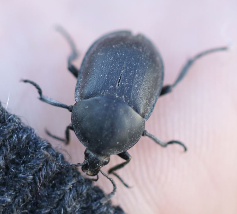 Ablattaria laevigata am 7. April 2018 südlich von Mannheim